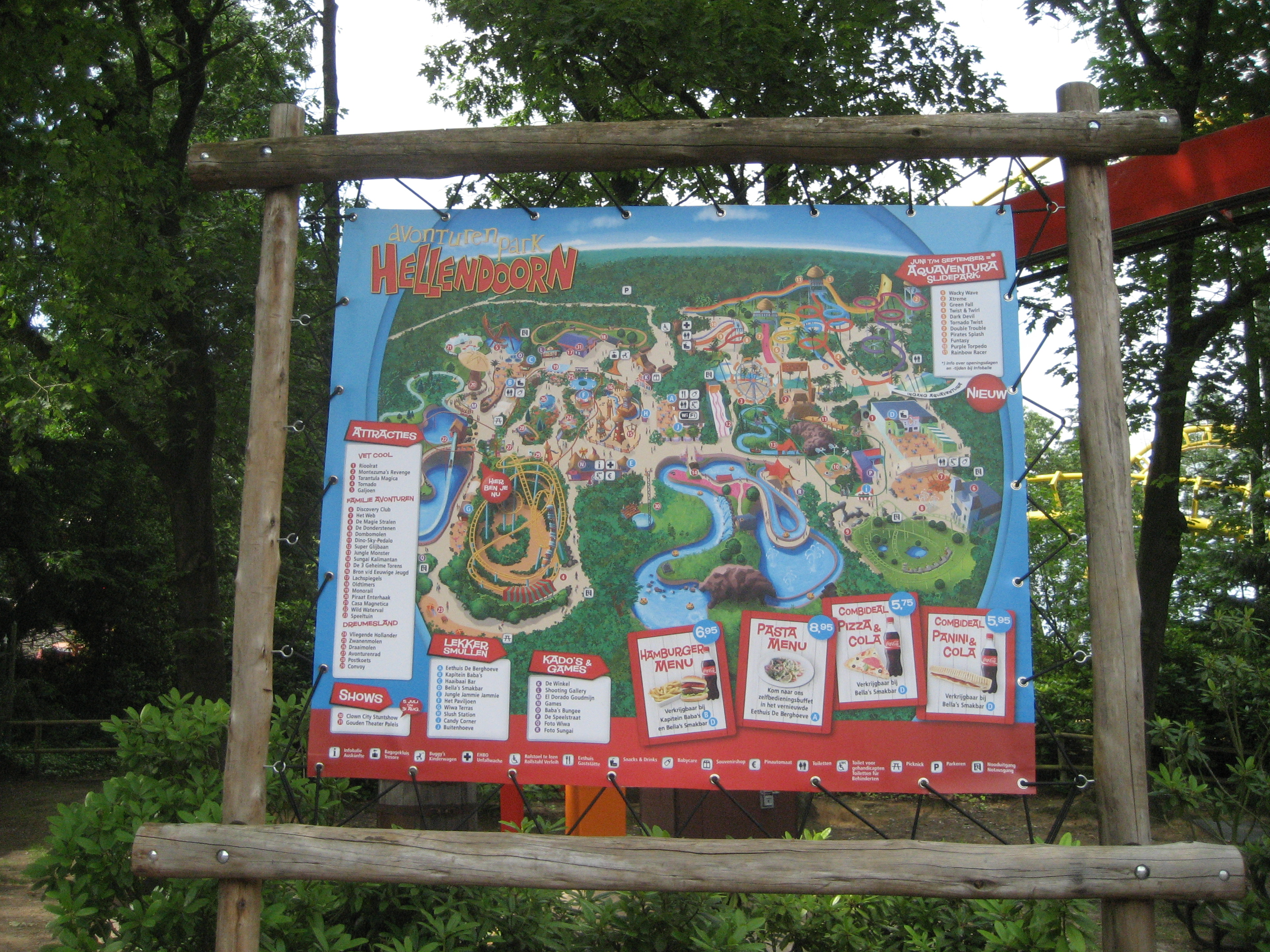 Avonturenpark Hellendoorn. Plattegrond